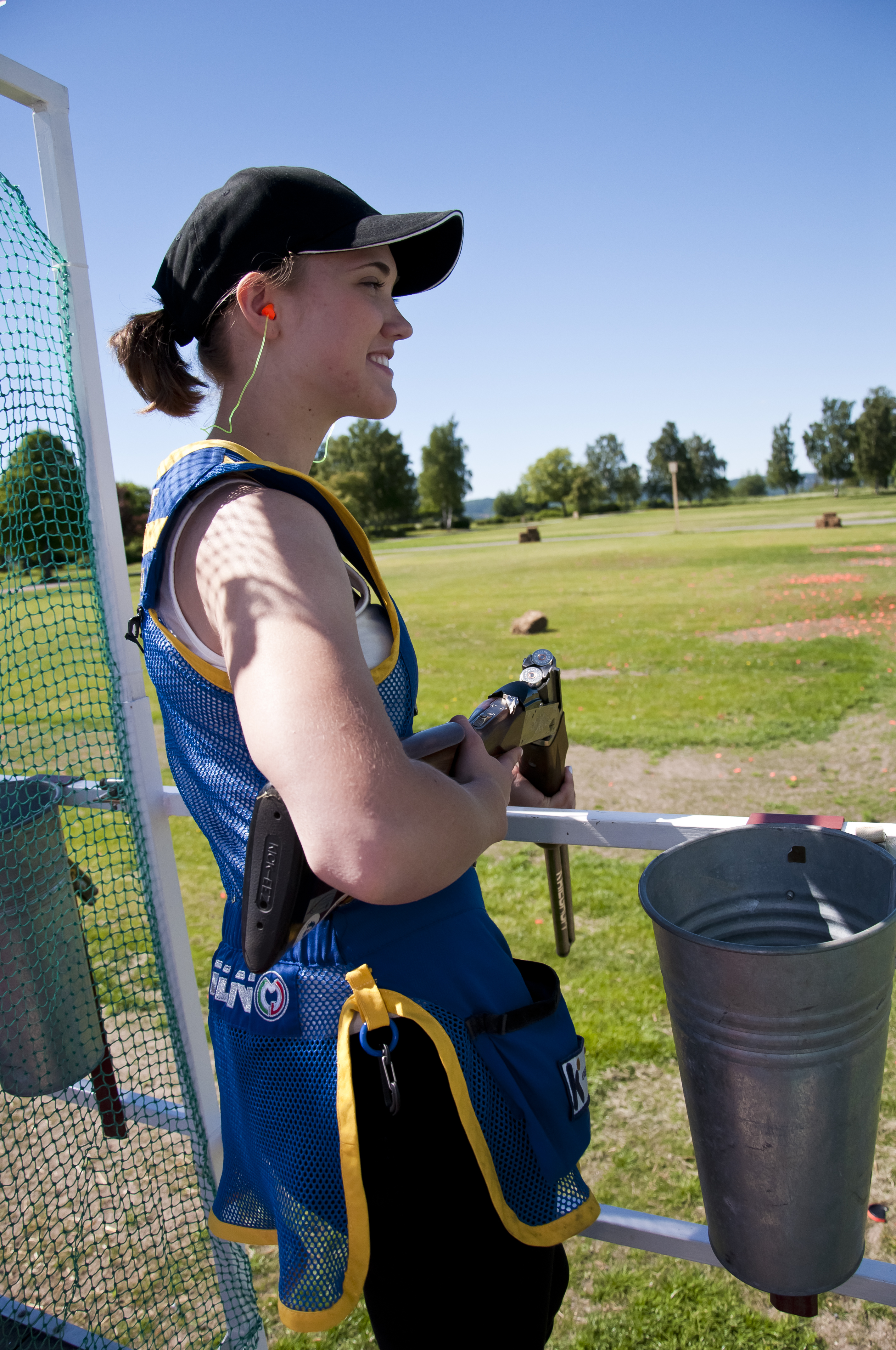 Therese Lundqvist vid skjutbanan på Elmiamässan 2011.